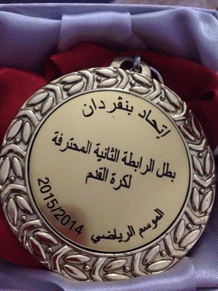 médaille l'union sportive de benguerdane champion de la ligue 2